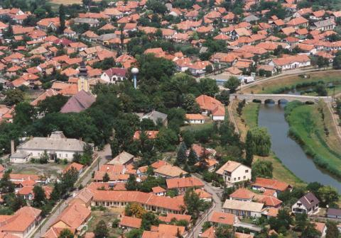 Jászdózsa, Hungary, aerialphotography. '1813 Jászdózsa Holt-Tarna híd' Rabl Károly (hu.wikipedia)